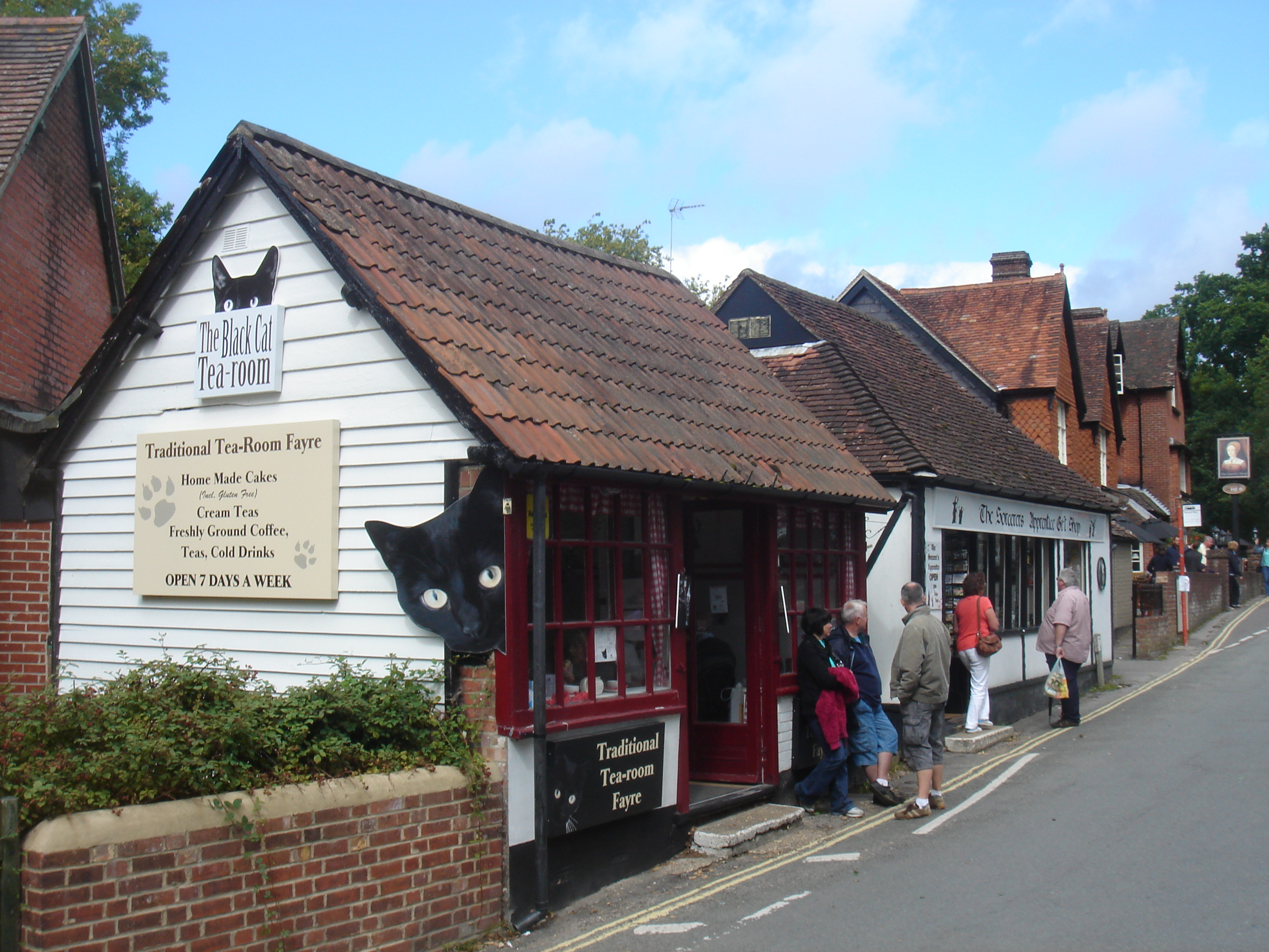 tea room